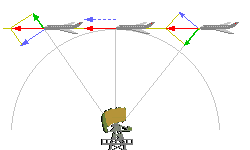 Radicales-socialistes und Tangentialgeschwindigkeit am Beispiel eines an einem Radargerät vorbeifliegenden Flugzeuges. Grün: Radialgeschwindigkeitsvektor, Rot: Momentangeschwindigkeitsvektor, Blau: Tangentialgeschwindigkeitsvektor